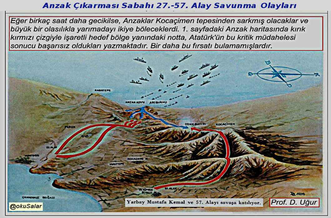 Anzak çıkarması sabahı 27. Alay bölgesinde düşmanı karşılarken 57. Alayın savaşa katılmasını açıklayan panaromik harita.